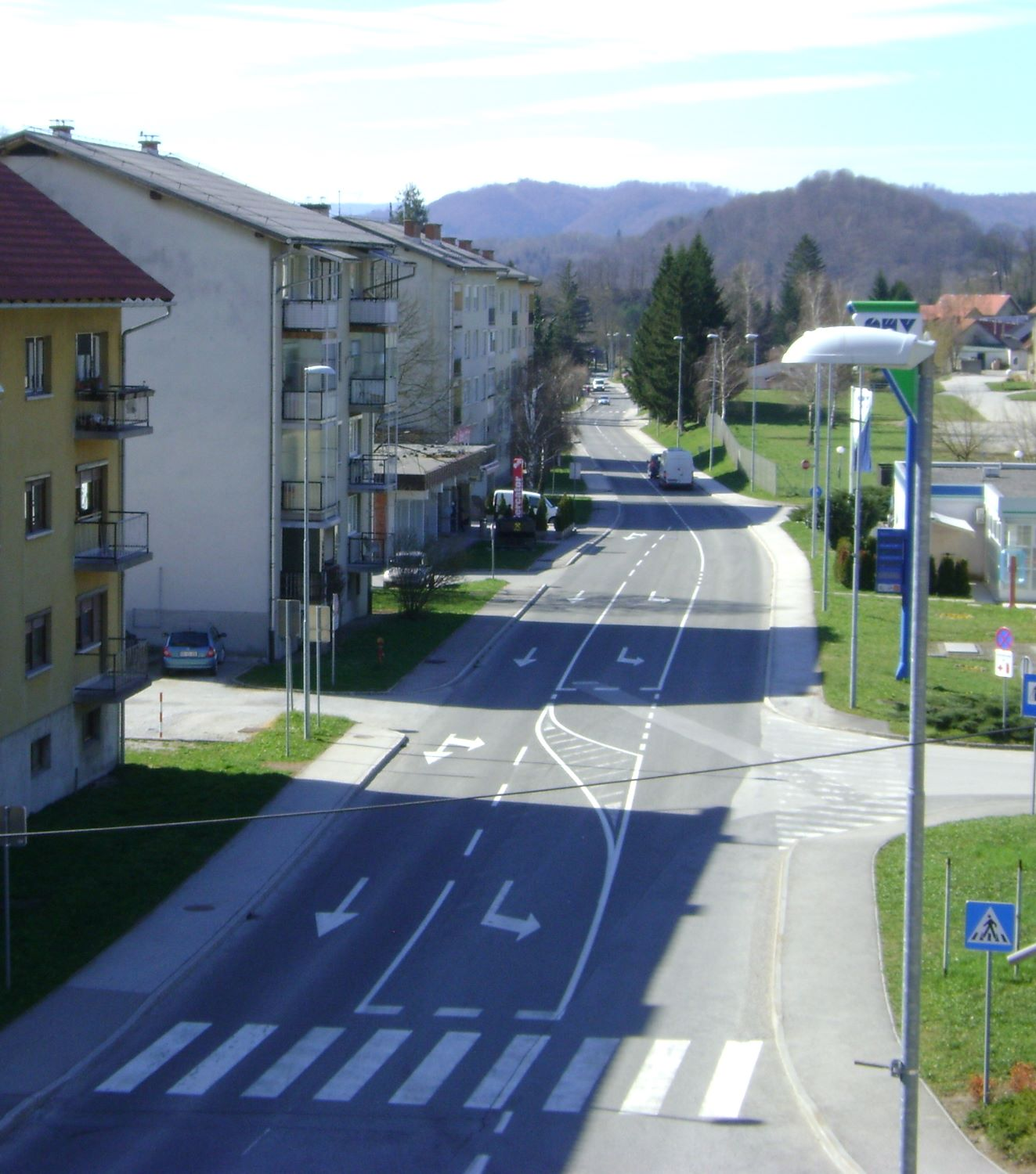 Titova cesta, Senovo